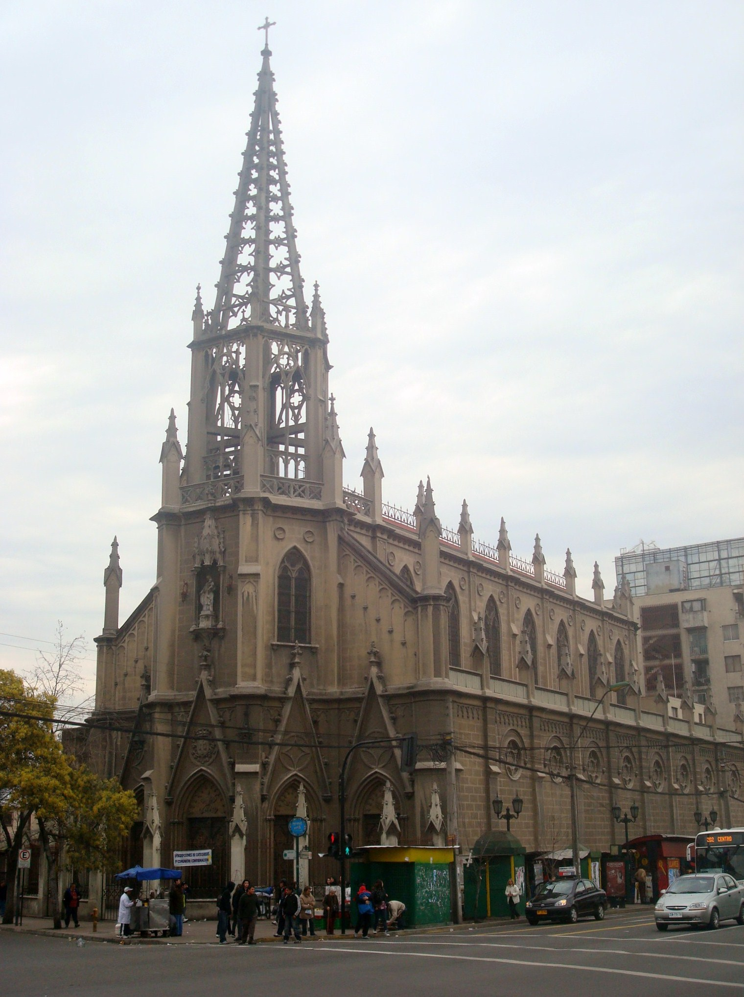 Iglesia del Niño Jesús de Praga, Independencia, Santiago de Chile